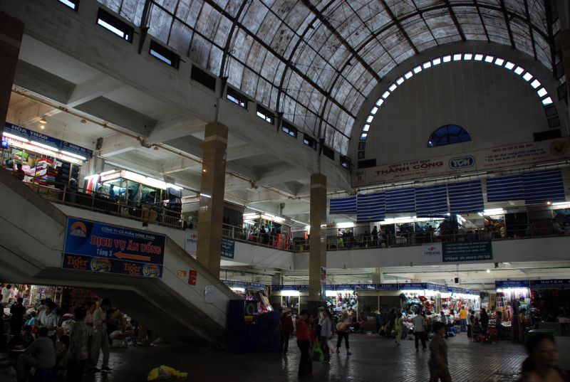 Inside Đồng Xuân Market, Hanoi.